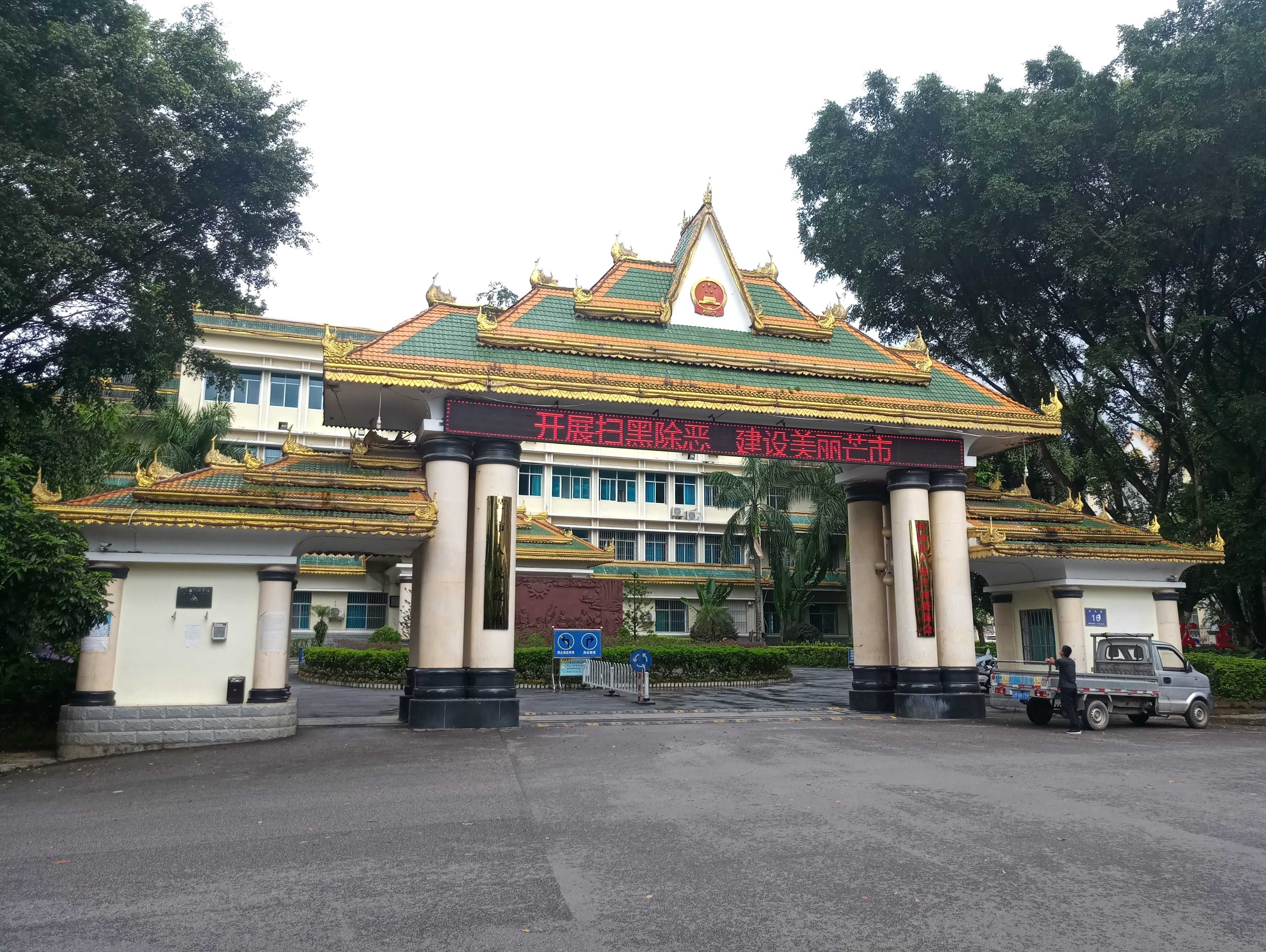 中文（中国大陆）: 芒市人民政府 中共芒市委